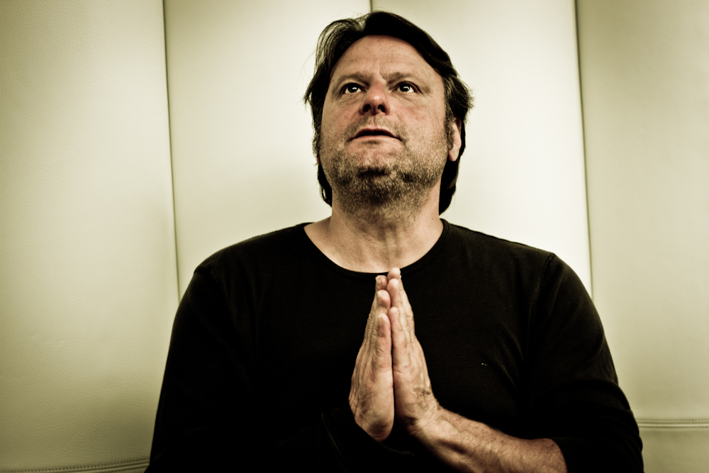 StampMedia/Alisa Nadezhkina